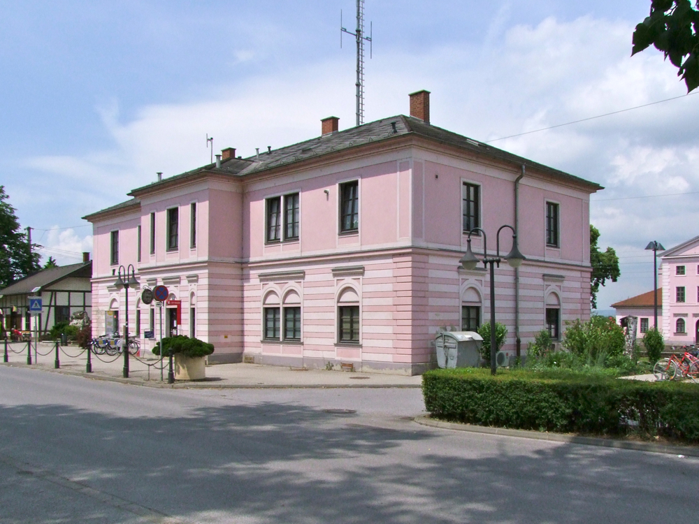 Bahnhofsgebäude Deutsch Wagram